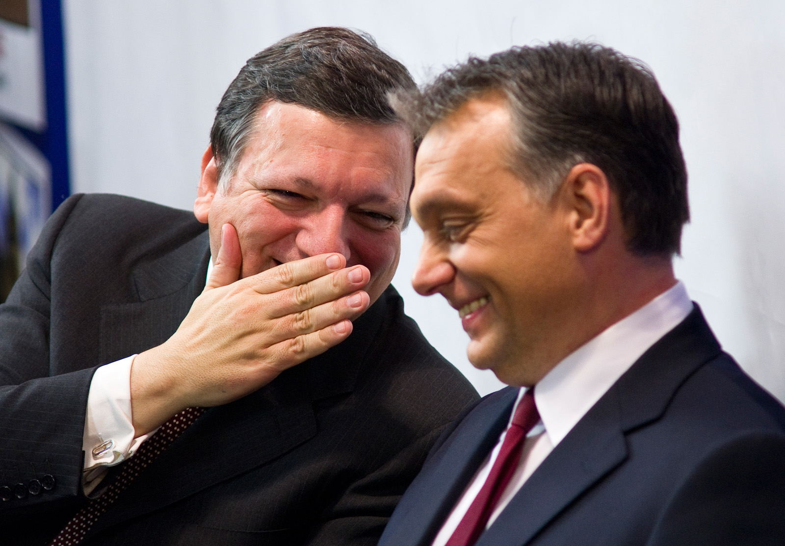 Budapest, 2011-01-07 Az Európa Pont ünnepélyes avatásán José Manuel Barroso az Európai Bizottság elnöke és Orbán Viktor magyar miniszterelnök. Fotó: Európai Bizottság/ Végel Dániel